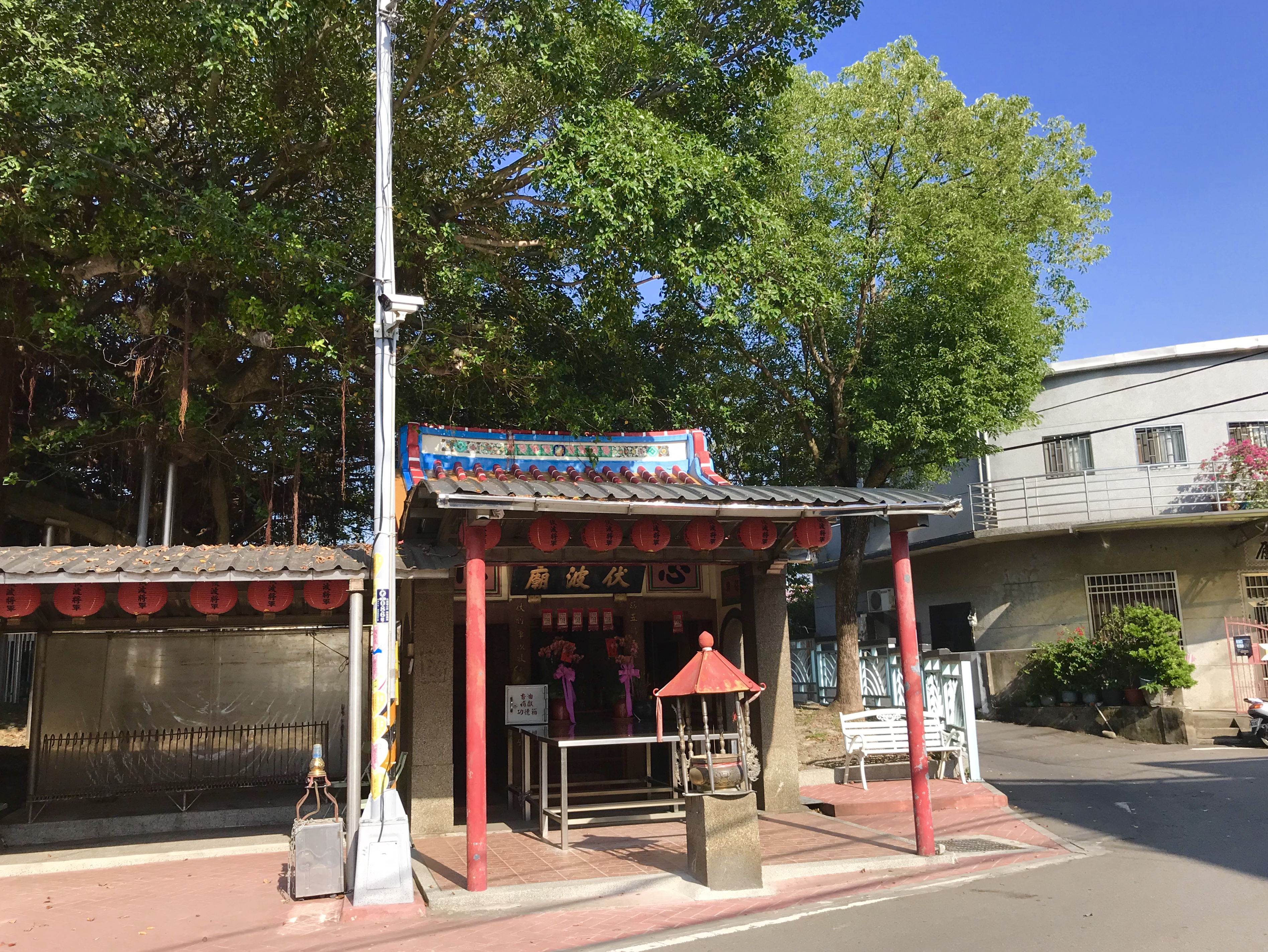 五穀崗伏波將軍廟